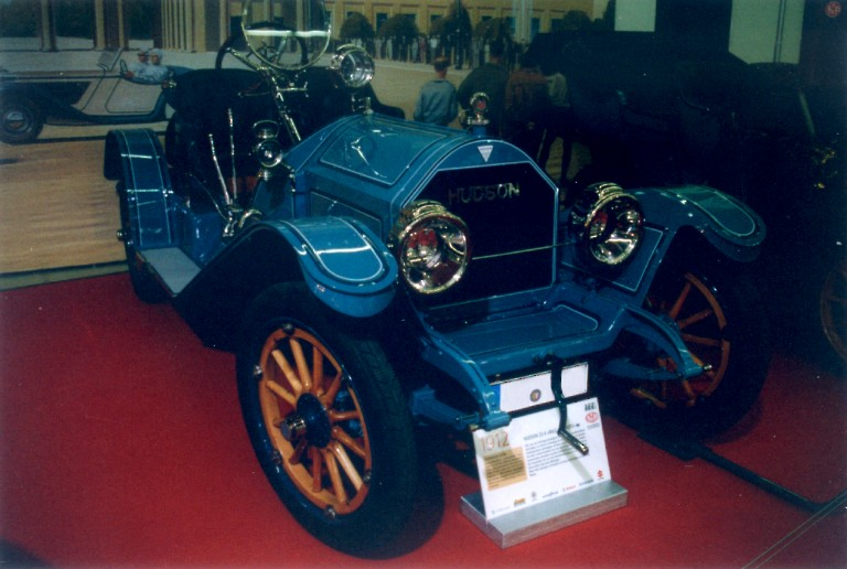 Hudson 33-4 Bj.1912-14 Zyl. : 4 Hubr.: 5000 ccm PS : 33 Km/h : 85 Kg : 750 Stück: 1000